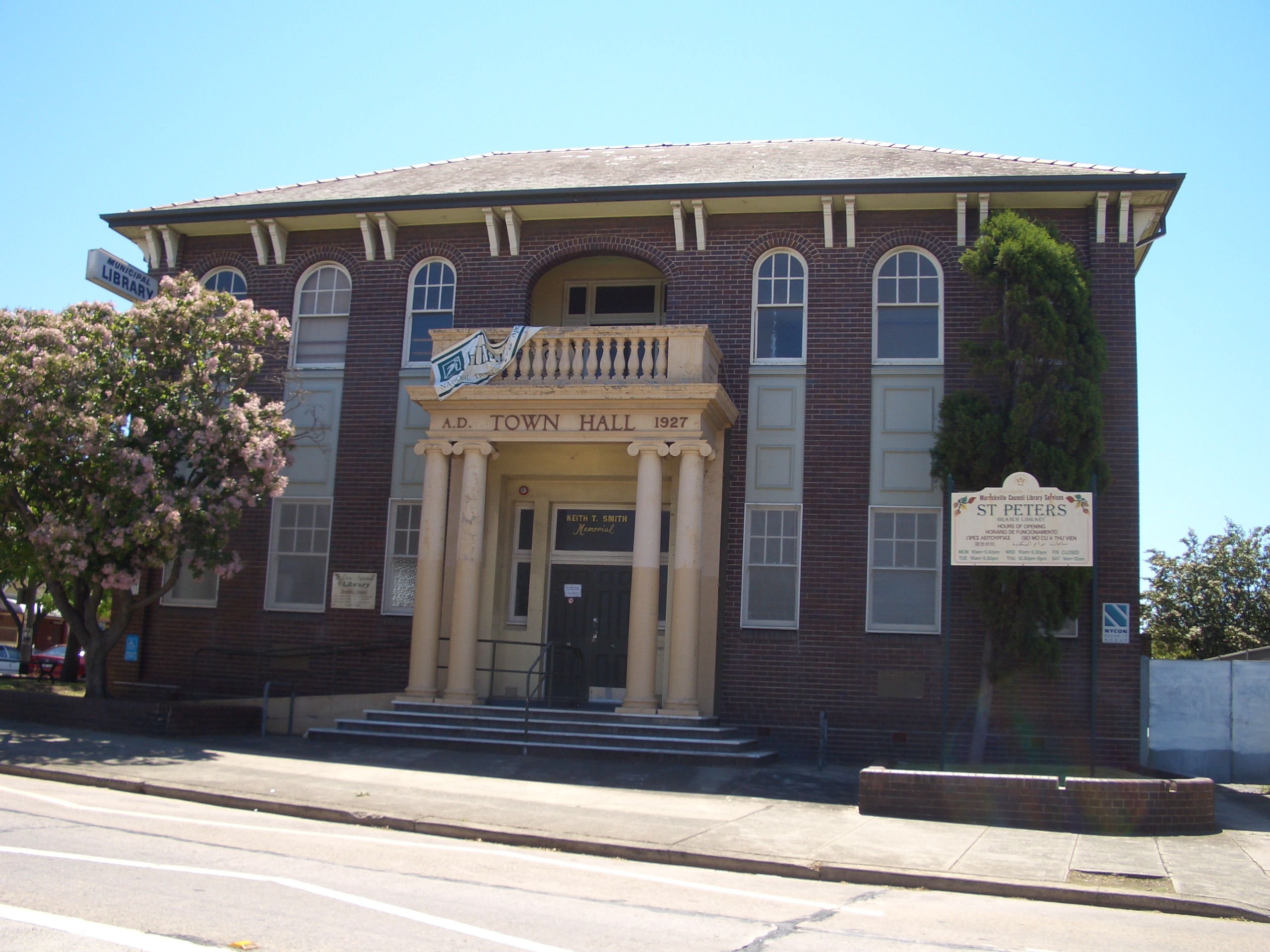 Sydenham_Town_Hall